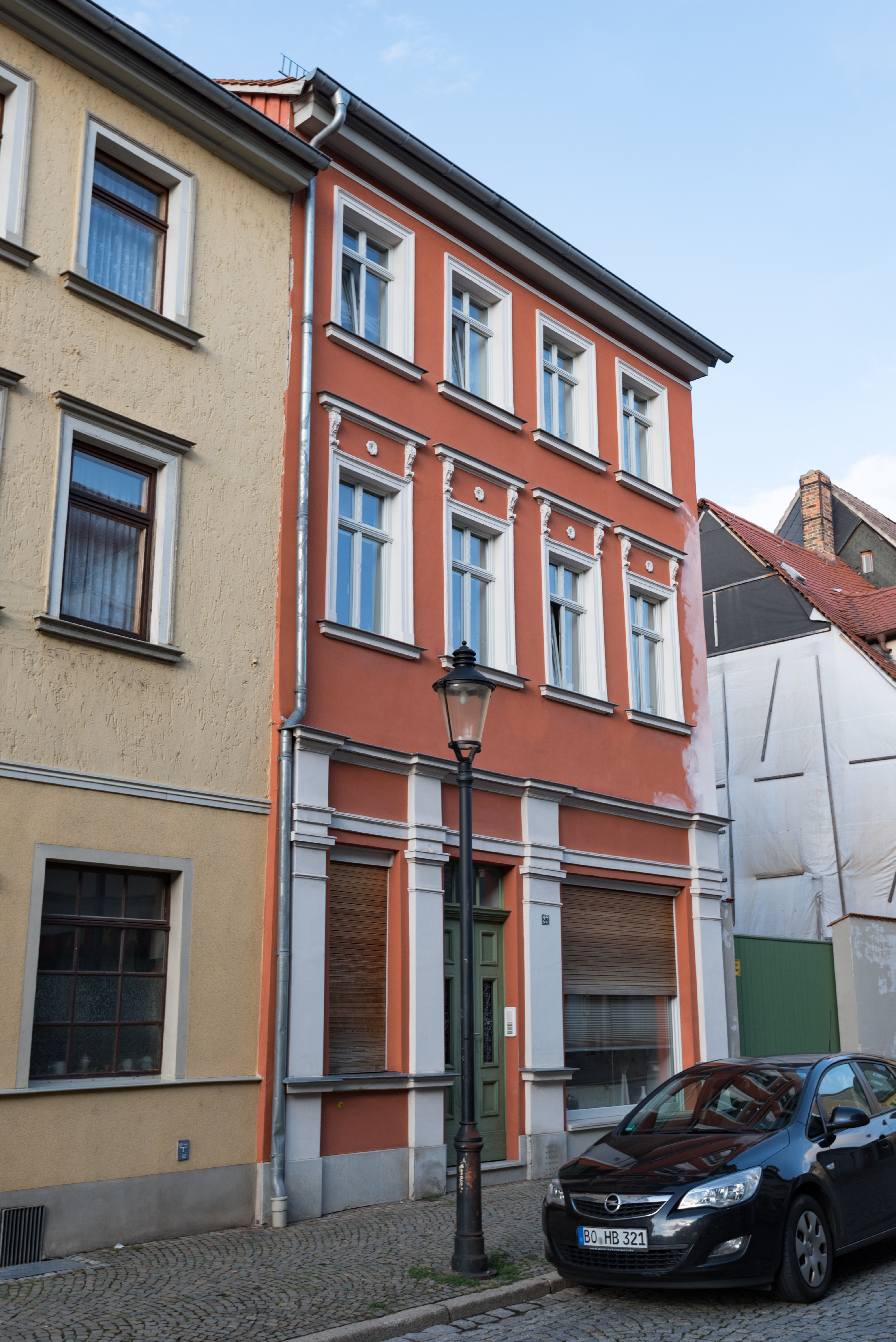 Naumburg (Saale), Wenzelsstraße 27